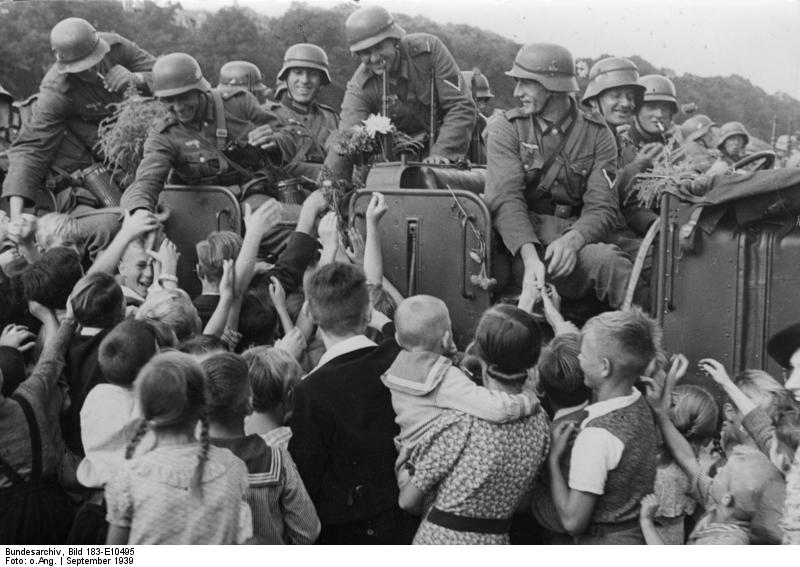 Dirschau, Begrüßung deutscher Soldaten Freudig bewegt begrüssen die Dirschauer [Tczew] die deutschen Soldaten. Scherl Bilderdienst-Hoffmann 5.9.39 [Herausgabedatum] "Fr" OKW [Polen, Dirschau (Landkreis Tczew).- Frauen und Kinder vor einem mit Blumen geschmückten Zugkraftwagen beim Händeschütteln mit deutschen Soldaten]